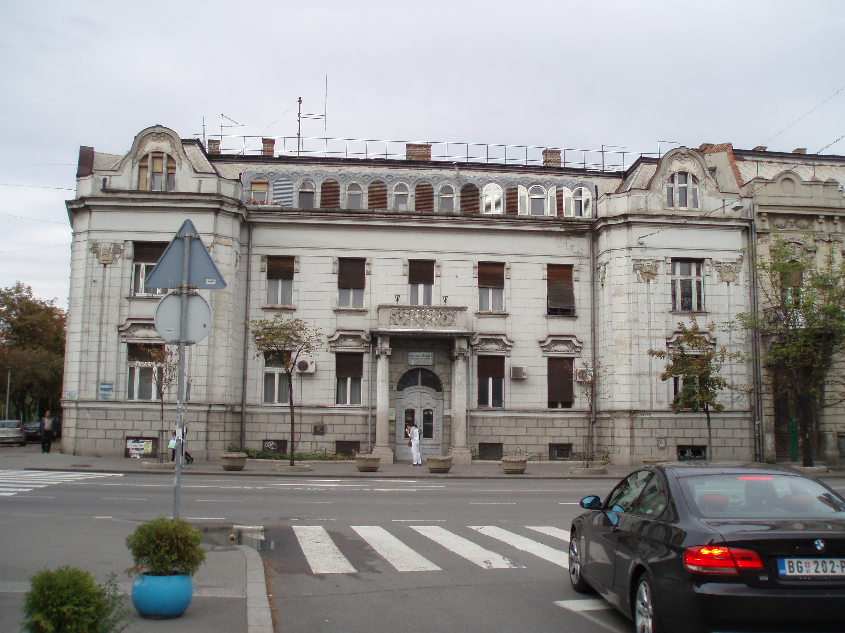 Zgrada Vodne zajednice na Avijatičarskom trgu u Zemunu, autor fotografije: Nicolo